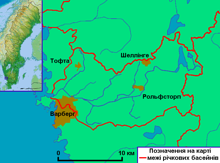 Карта річки Гімлеон на півдні Швеції у лені Галланд. Створено на основі карти річок лену Галланд Hallands län на сайті SMHI Шведського інституту метеорології та гідрології й карти басейну річки Гімлеон Avrinningsområde nr 104-Himleån. Використано карту File:Sweden relief location map.jpg.